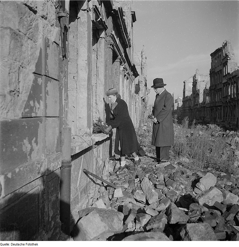 Original image description from the Deutsche FotothekGedenken am Totensonntag vor einer Ruine